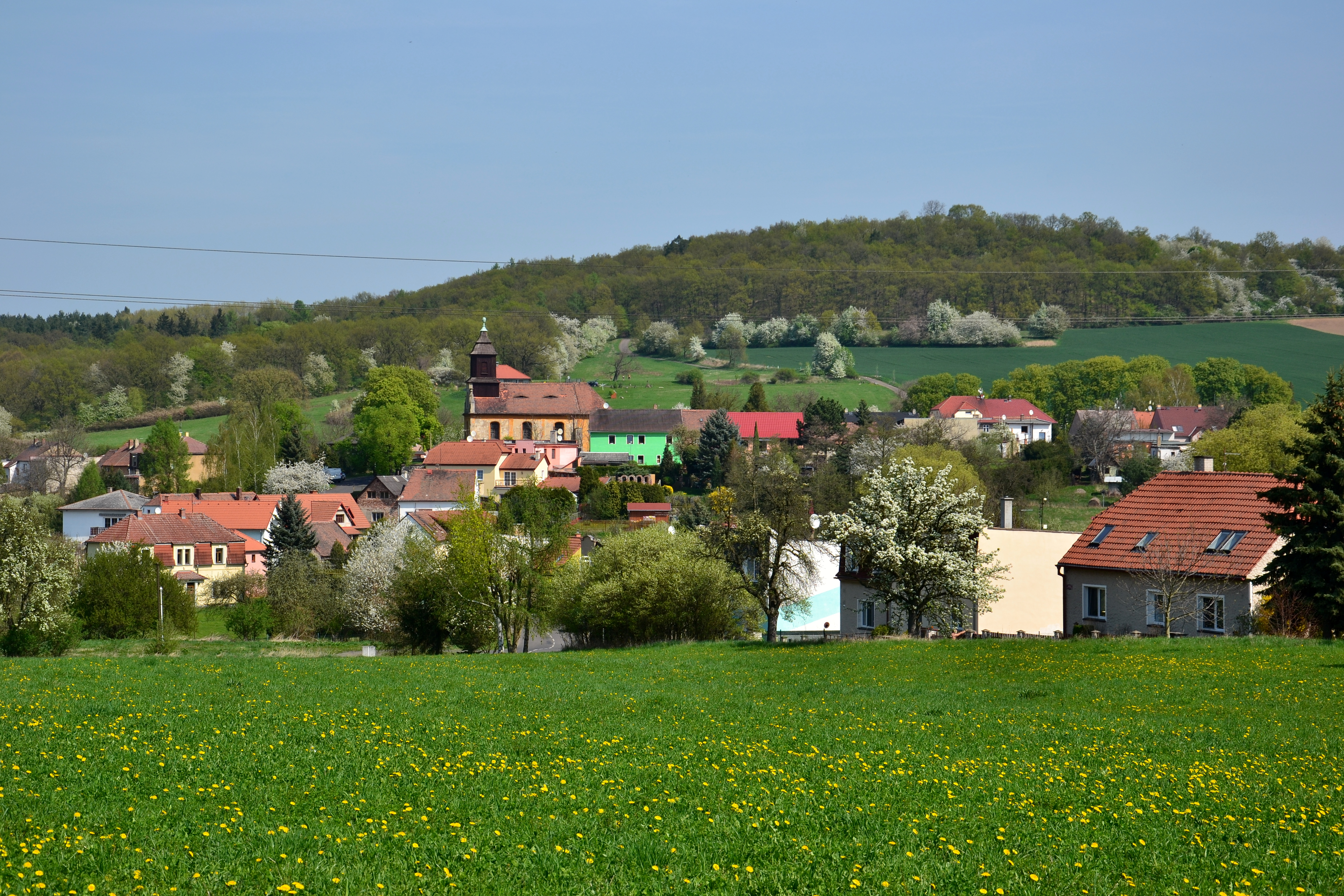 Hradiště – pohled z jihu